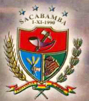 ESCUDO SACABAMBA